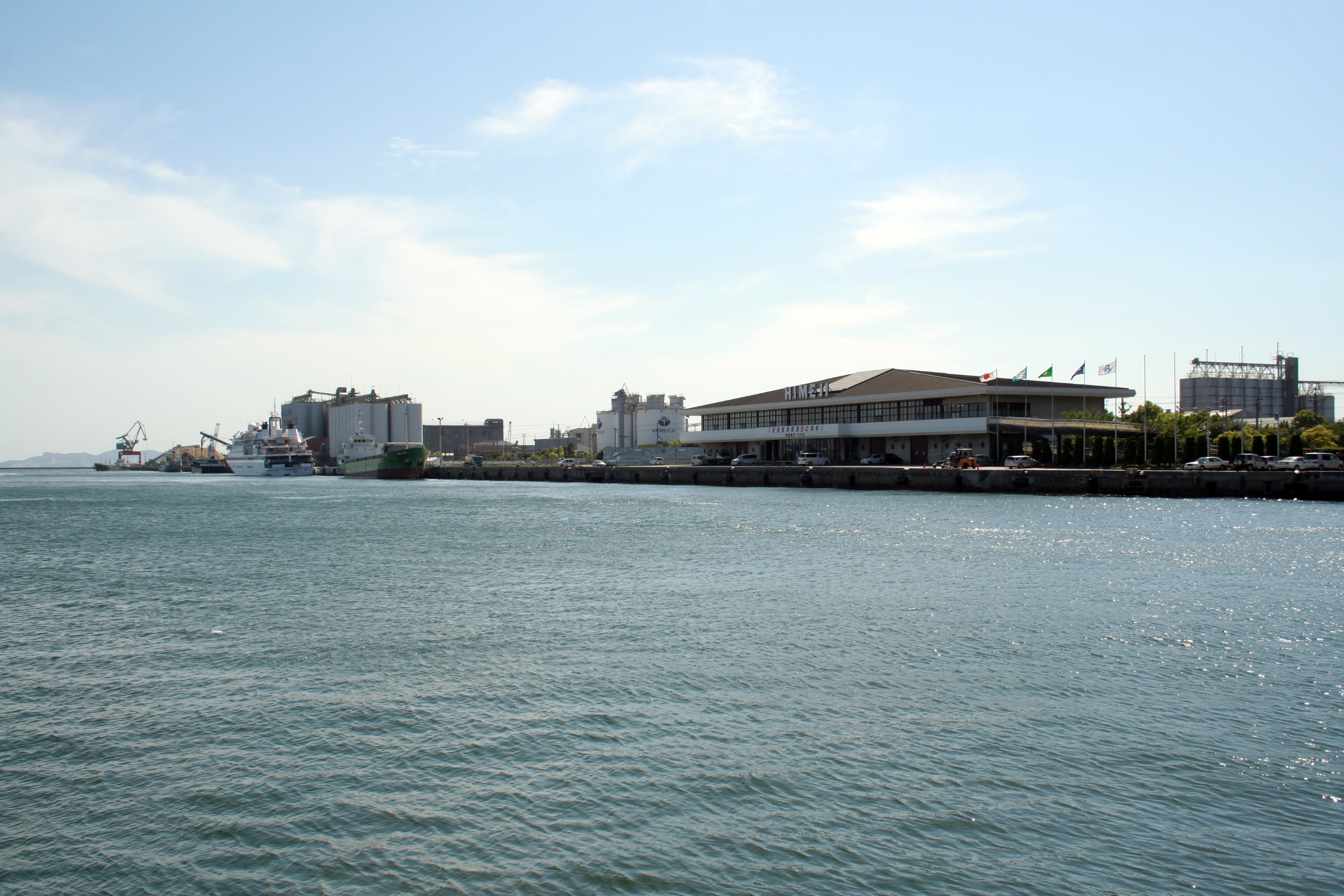 飾磨埠頭の旅客船ターミナル遠望。